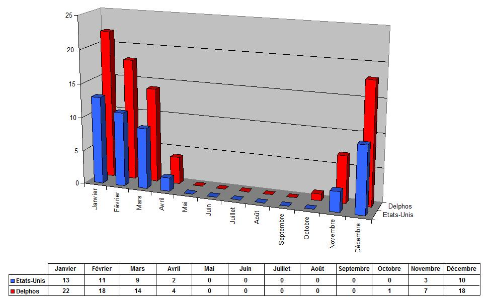 Chutes de neiges à Delphos (Ohio - Etats-Unis), en cm